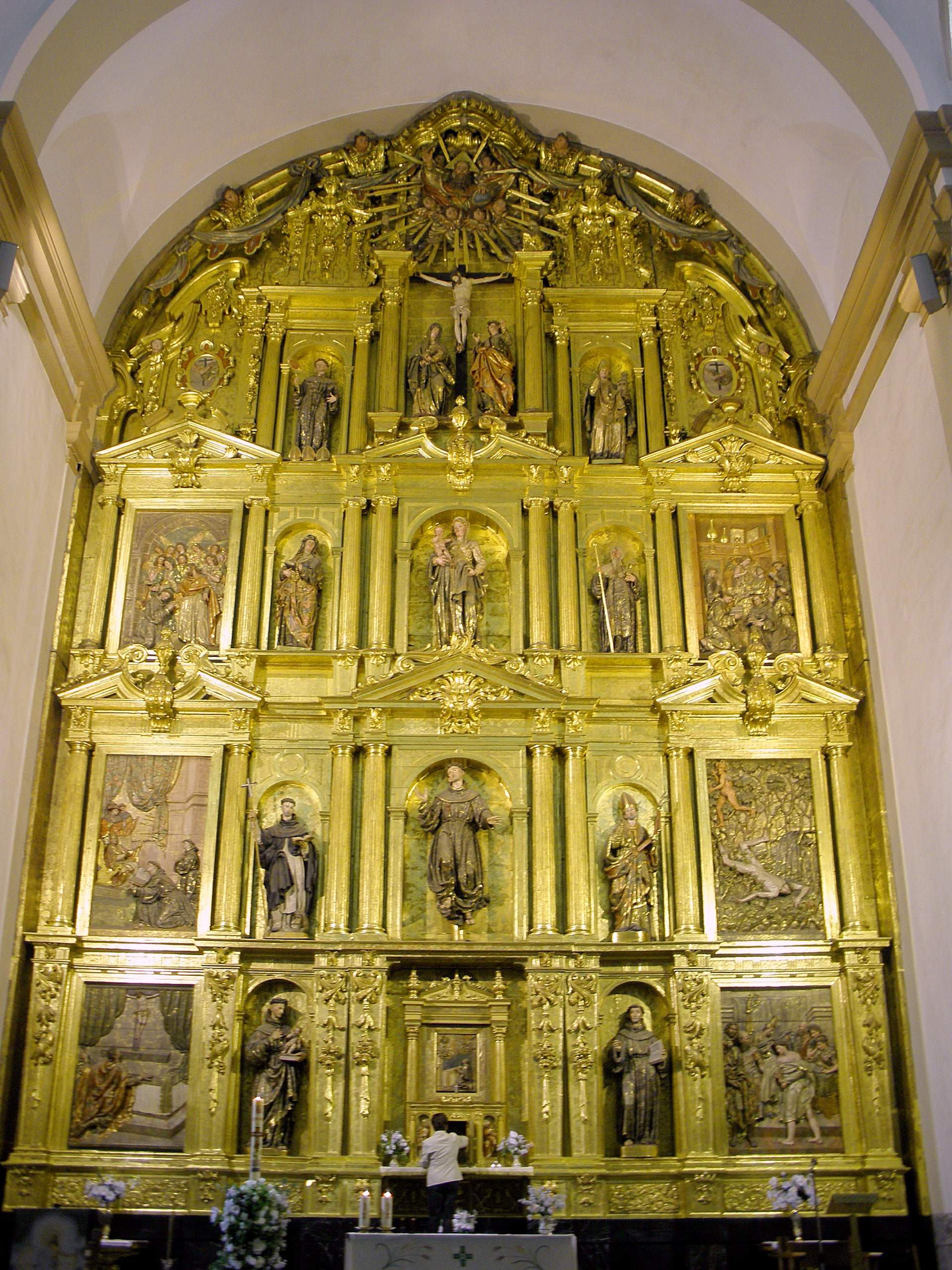 Retablo mayor de la iglesia de San Francisco de Tolosa (Guipúzcoa)